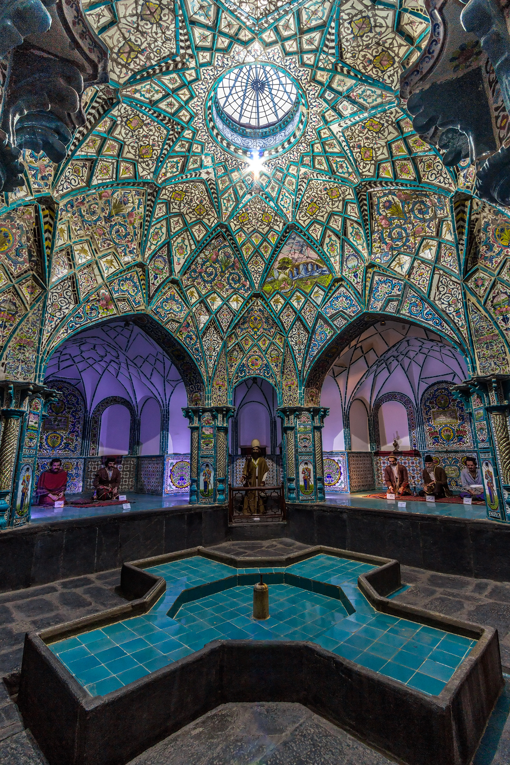 حمام چهار فصل